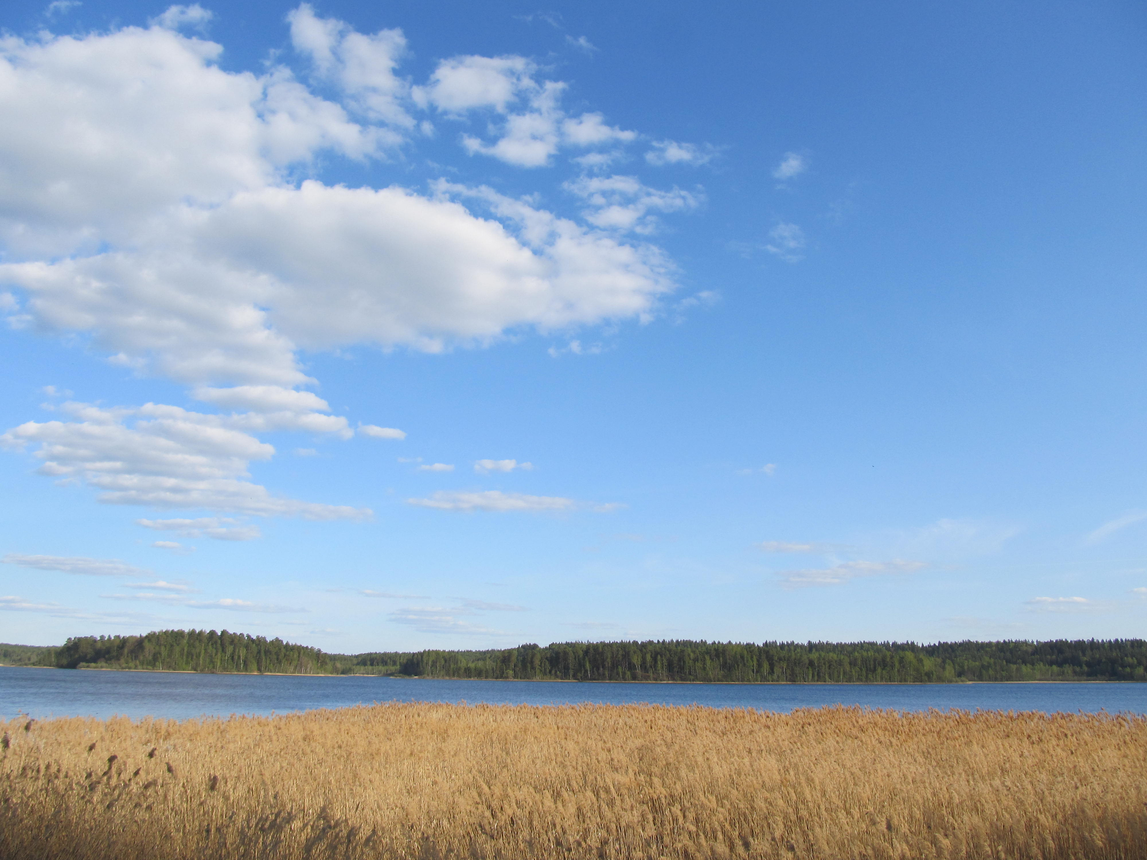 Озеро Сапшо, Демидовский район This image is related to the protected area of Russia number 6720041